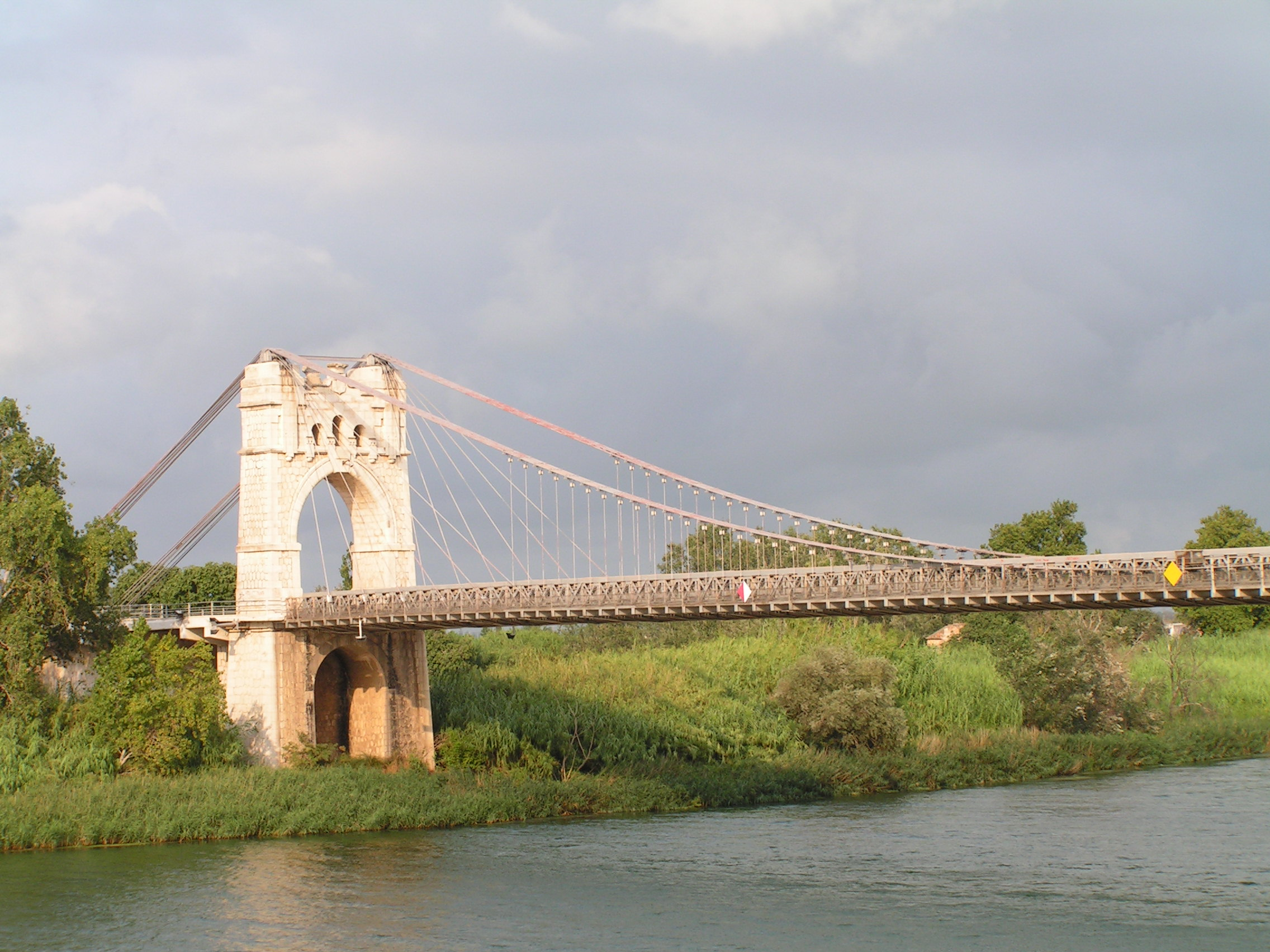 Pont Penjat